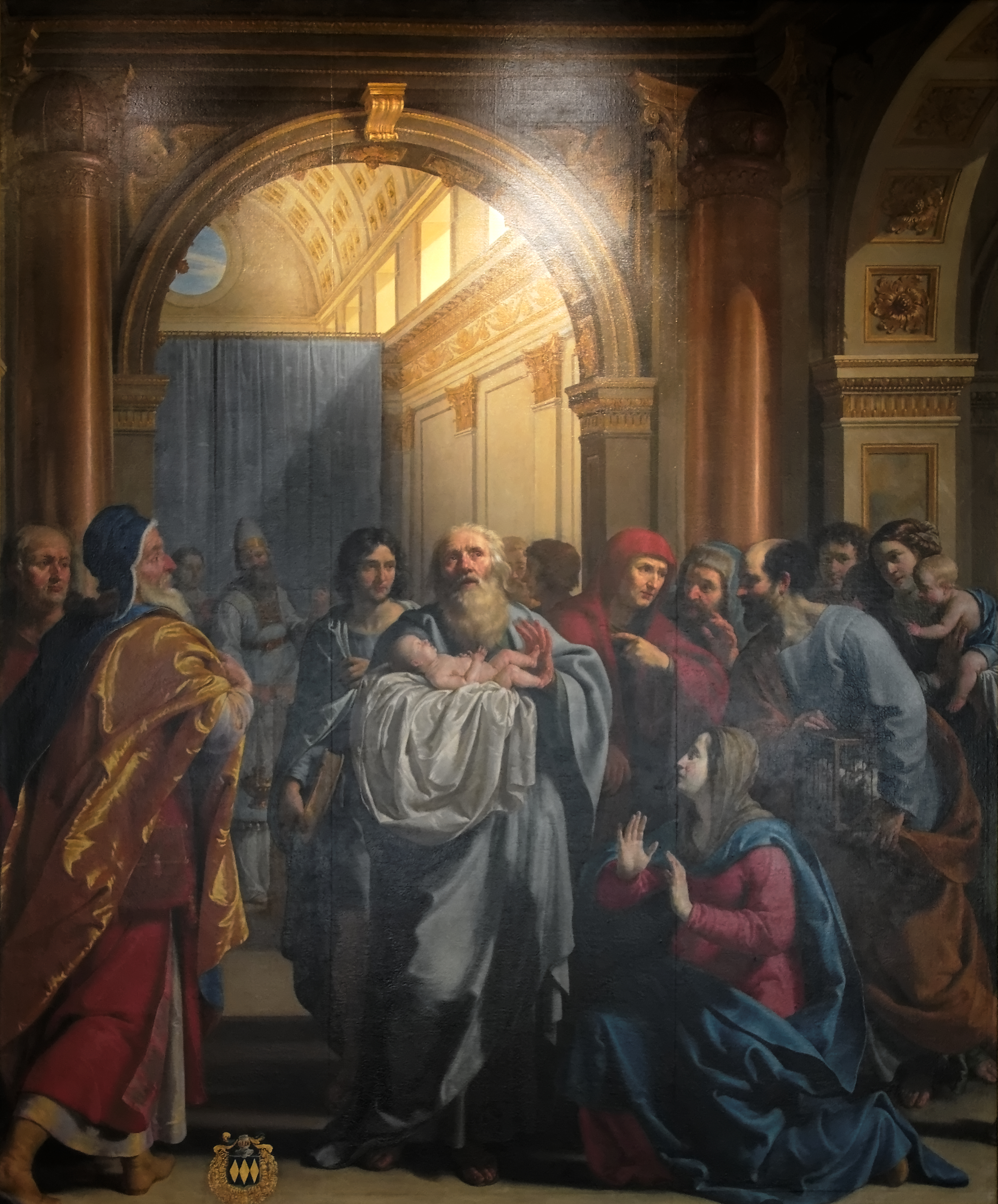 Ce tableau fut commandé par Claude Bouthiller, conseiller au parlement de Paris et ministre de Richelieu, et sa femme, protecteur de l'artiste, pour en faire don à l'église du Carmel du Faubourg Saint Jacques à Paris. Il appartient à une série de six tableaux peint par Champaigne et son atelier